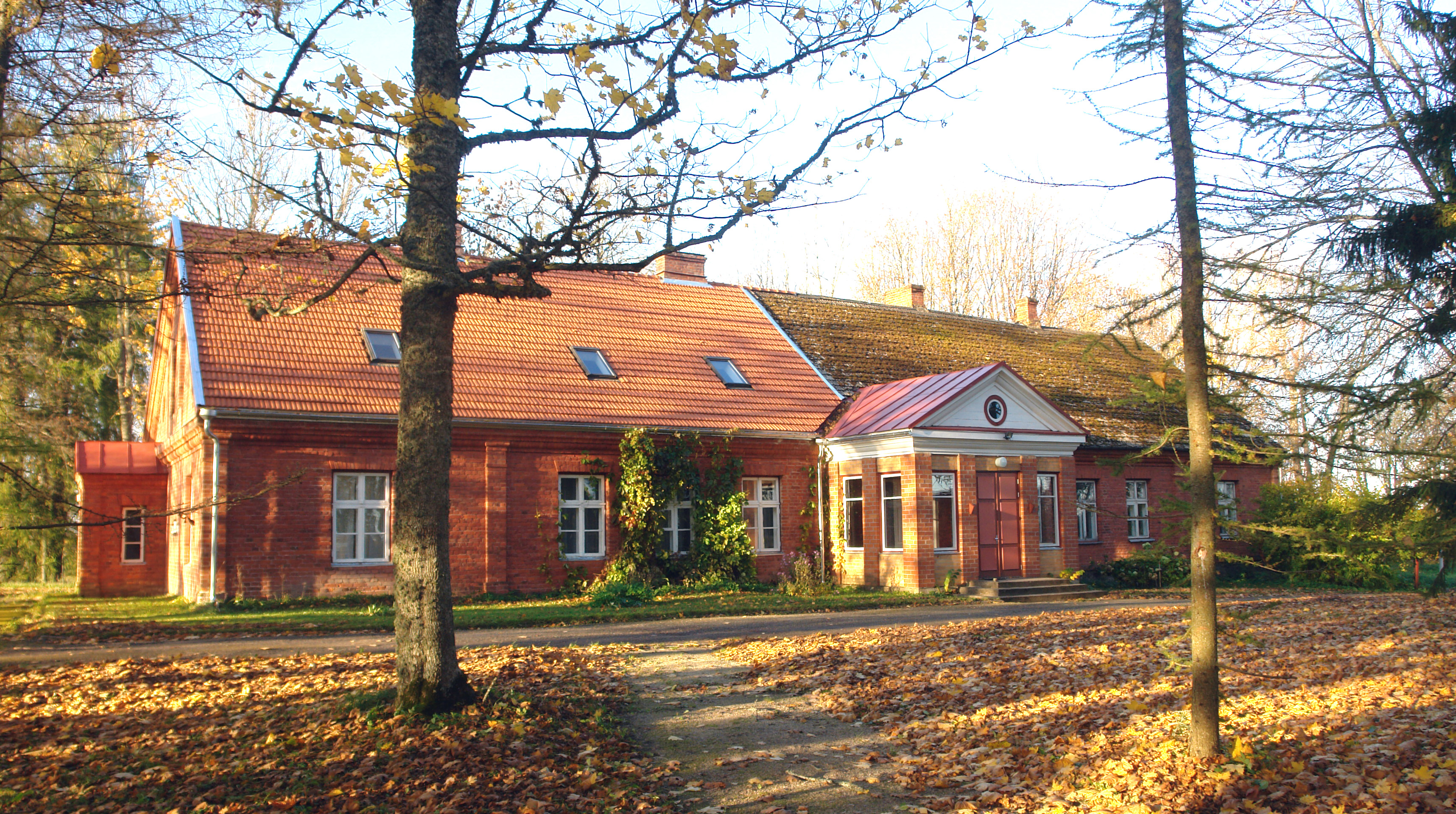 Laiuse pastoraadi peahoone